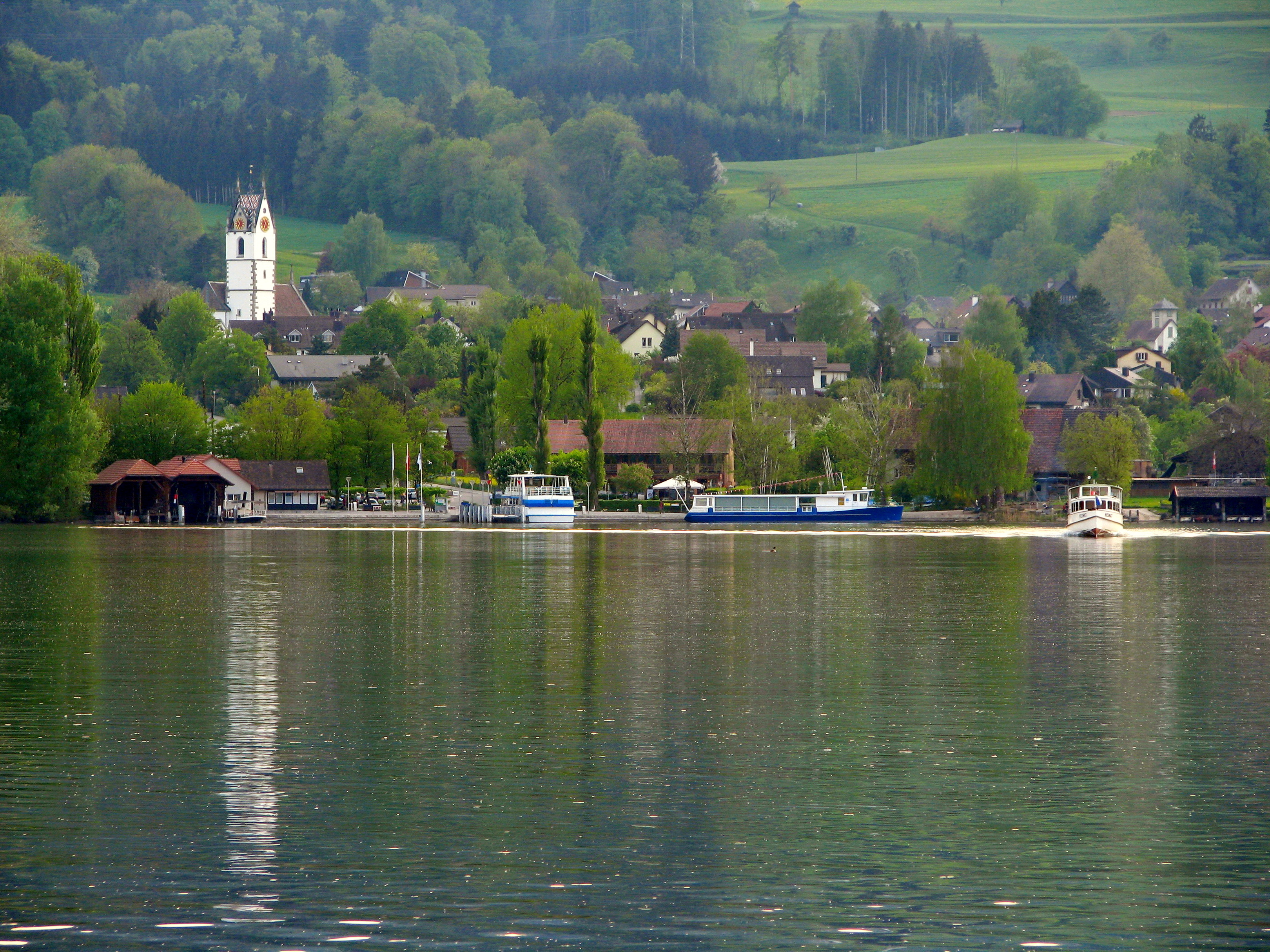 Greifensee, Maur in the background